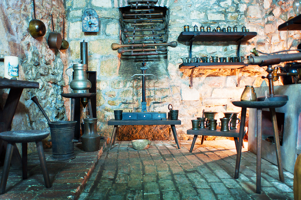 Casa Hintz adaposteste Muzeul Farmaciei. In anul 1573 este amintita ca prima farmacie din Cluj. Subsolul este amenajat ca "laborator" al acelei epoci.